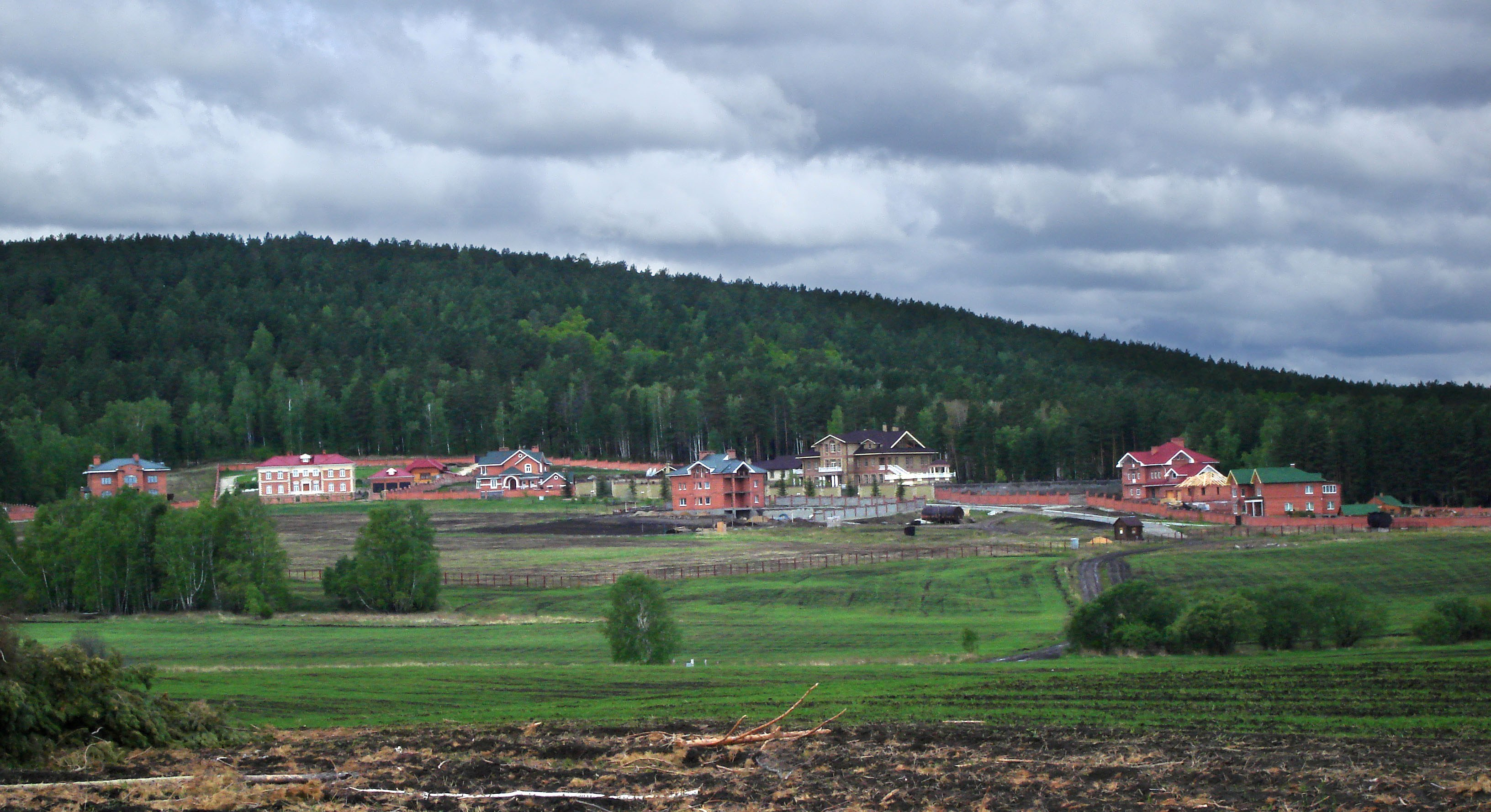 Рабочий поселок. Вид с 27 км Култукского тракта.